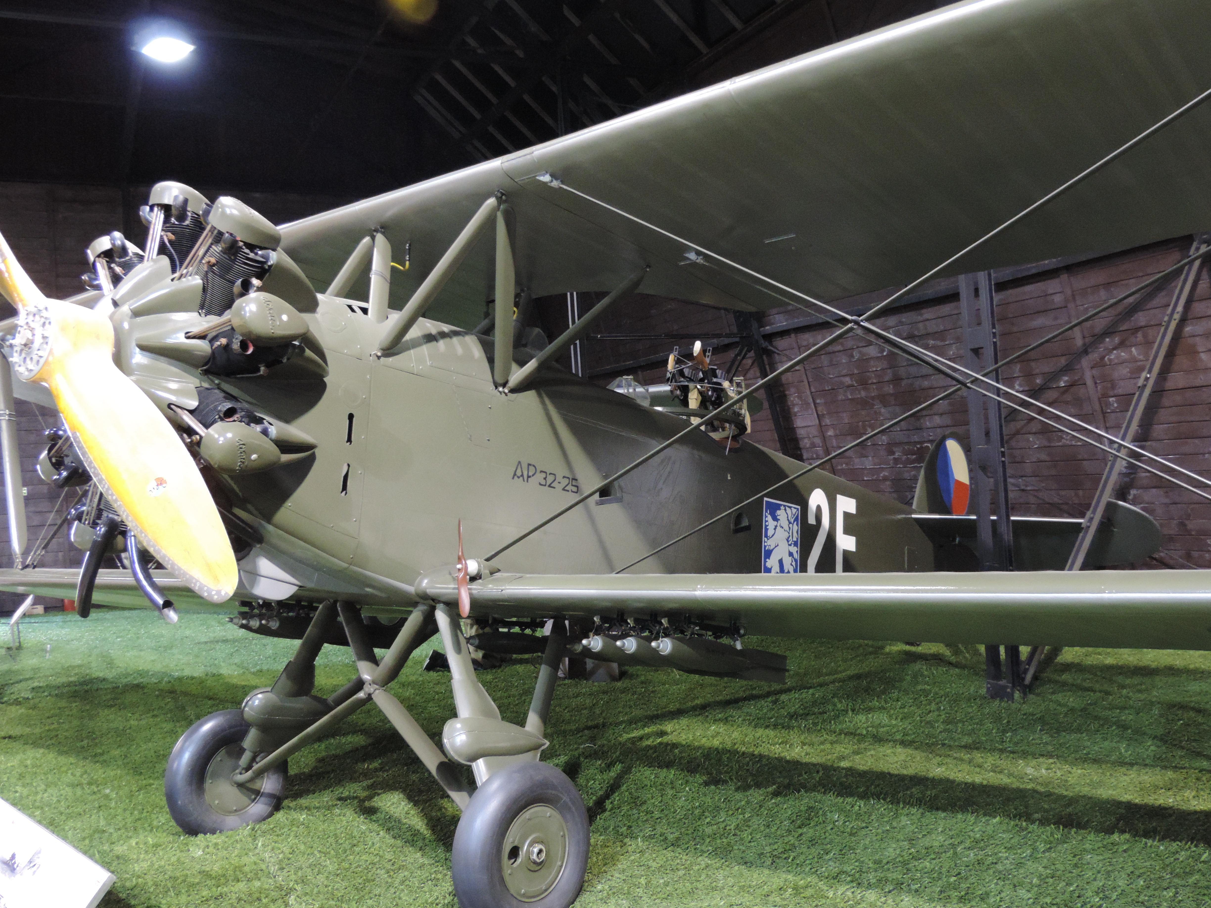 Aero Ap.32 im Flugzeugmuseum Kbely